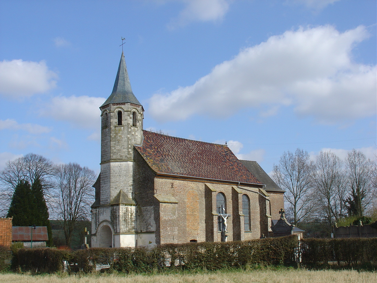 Église de Galametz